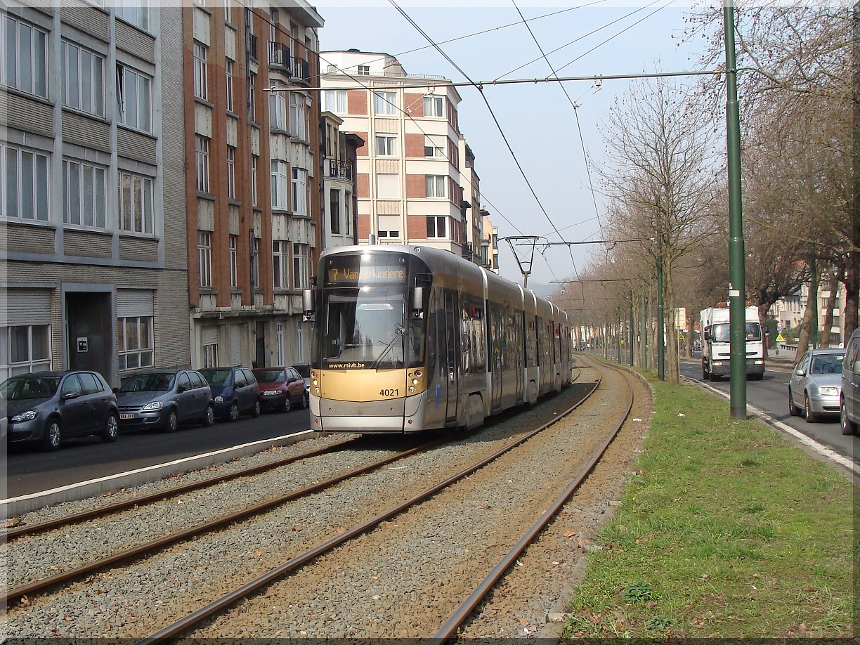 Motrice 4021 sur la ligne 07